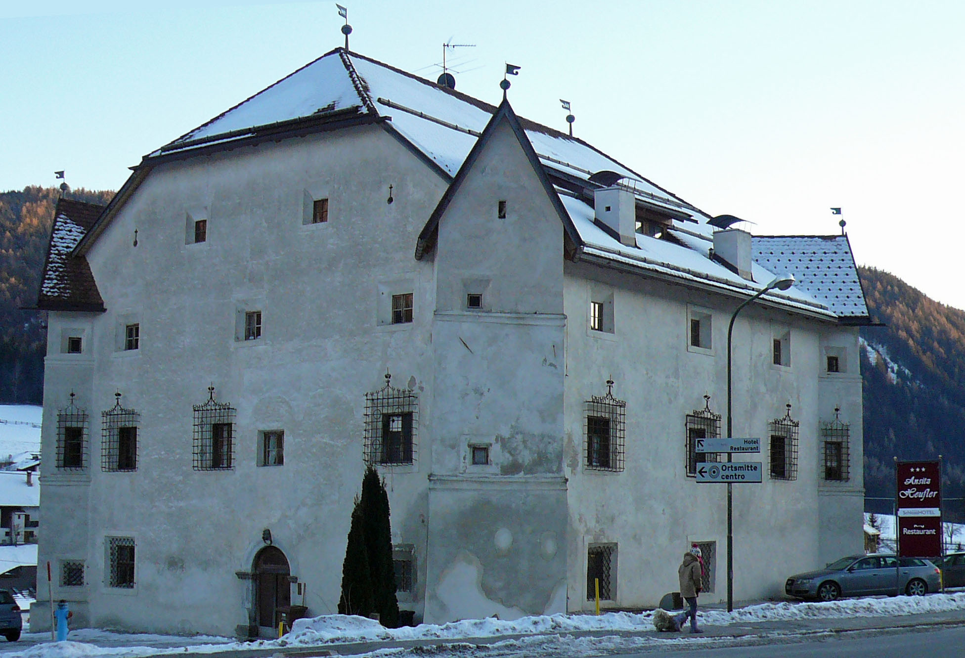 Historischer Ansitz Heufler in Rasen-Antholz (Südtirol).